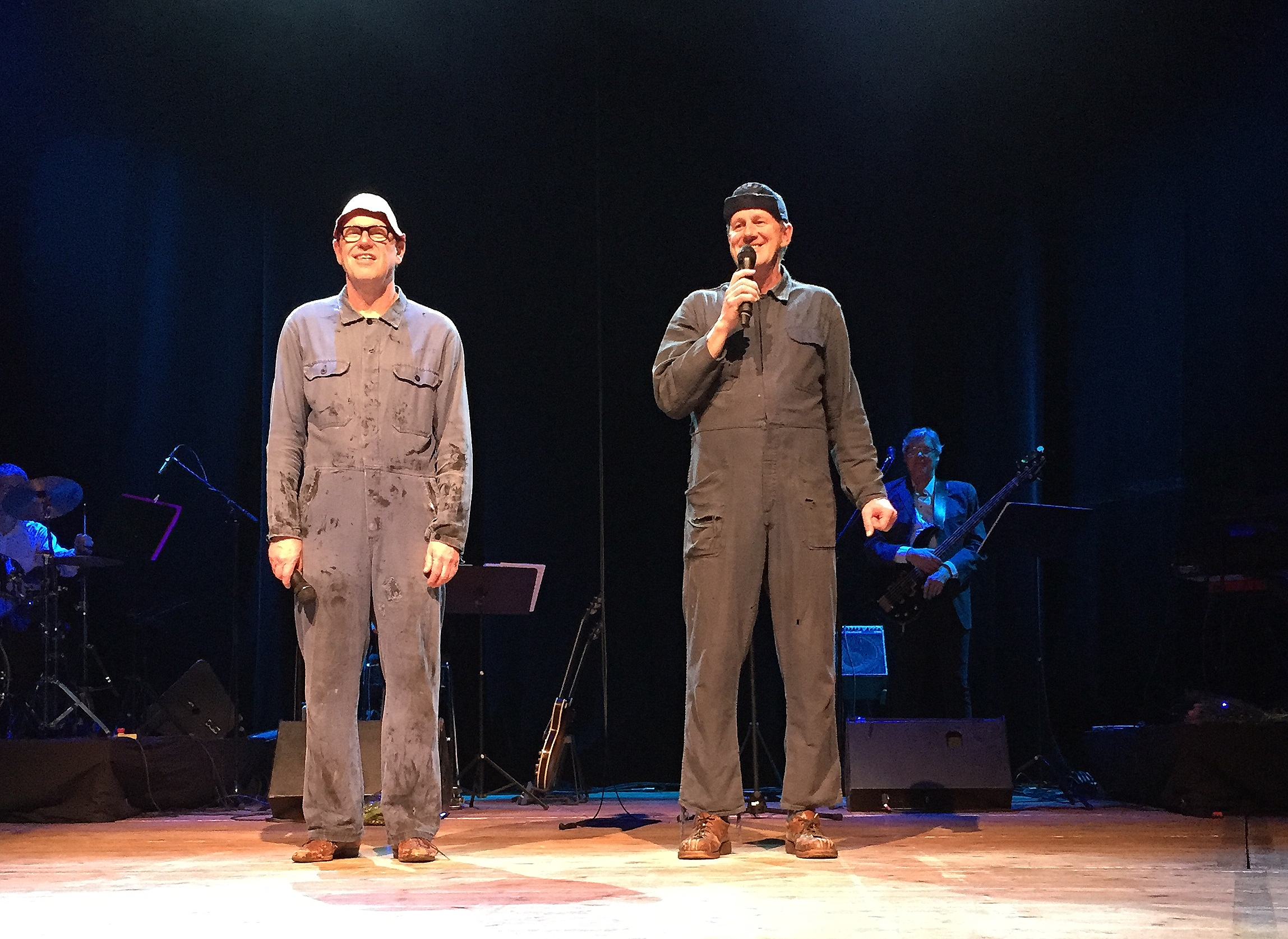 Roy & Roger